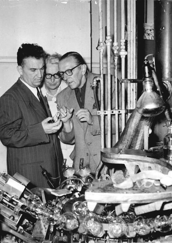 Zentralbild Hesse 14.7.1958. Ausländische Gäste zum V. Parteitag besuchten Berliner Glühlampenwerk. Gäste aus der Volksrepublik Albanien sowie aus Basilien und Marokko, die als Gäste zum V. Parteitag in Berlin weilten, besuchten am 14.7.1958 die Werktätigen des VEB Berliner Glühlampenwerk. UBz.: Das Mitglied des Politbüros des ZK der Partei der Arbeit Albaniens, [Gogo] Nushi (links), bei der Besichtung des Werkes.